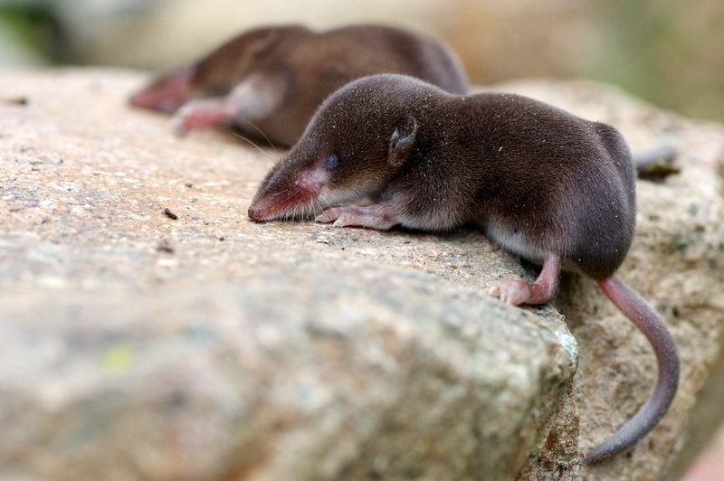 Młode ryjówki aksamitne (Sorex Araneus)